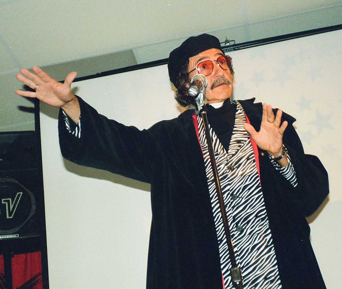 Baltimore M.D. 2000